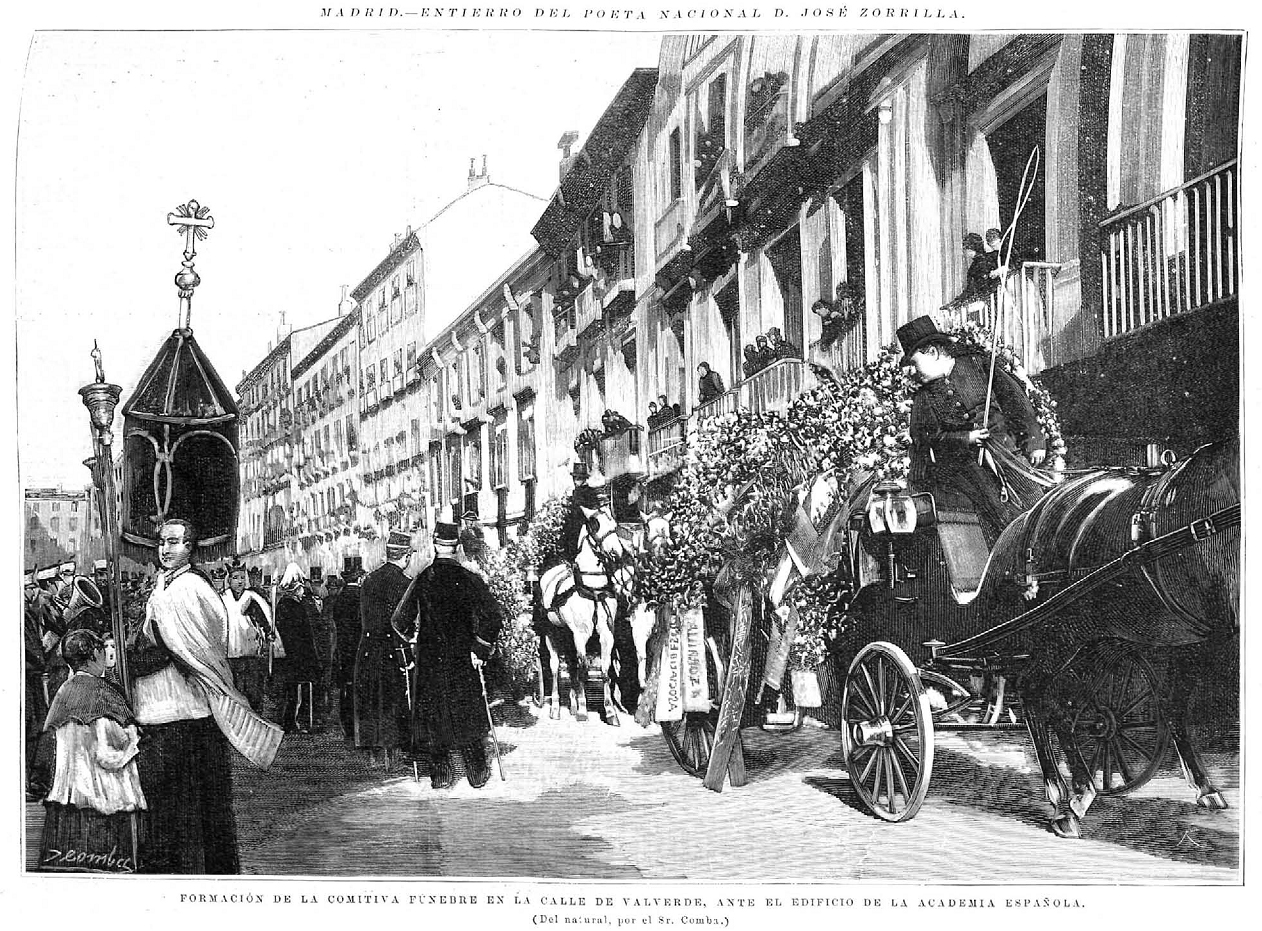 Madrid, entierro de Zorrilla, formación de la comitiva fúnebre en la calle de Valverde, ante el edificio de la Academia Española, en la revista La Ilustración Española y Americana.